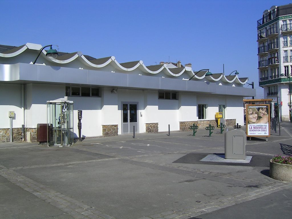 Livry-Gargan Gare de Gargan (côté rue) Photo personnelle (own work) de Marianna